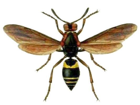 Monobia sylvatica